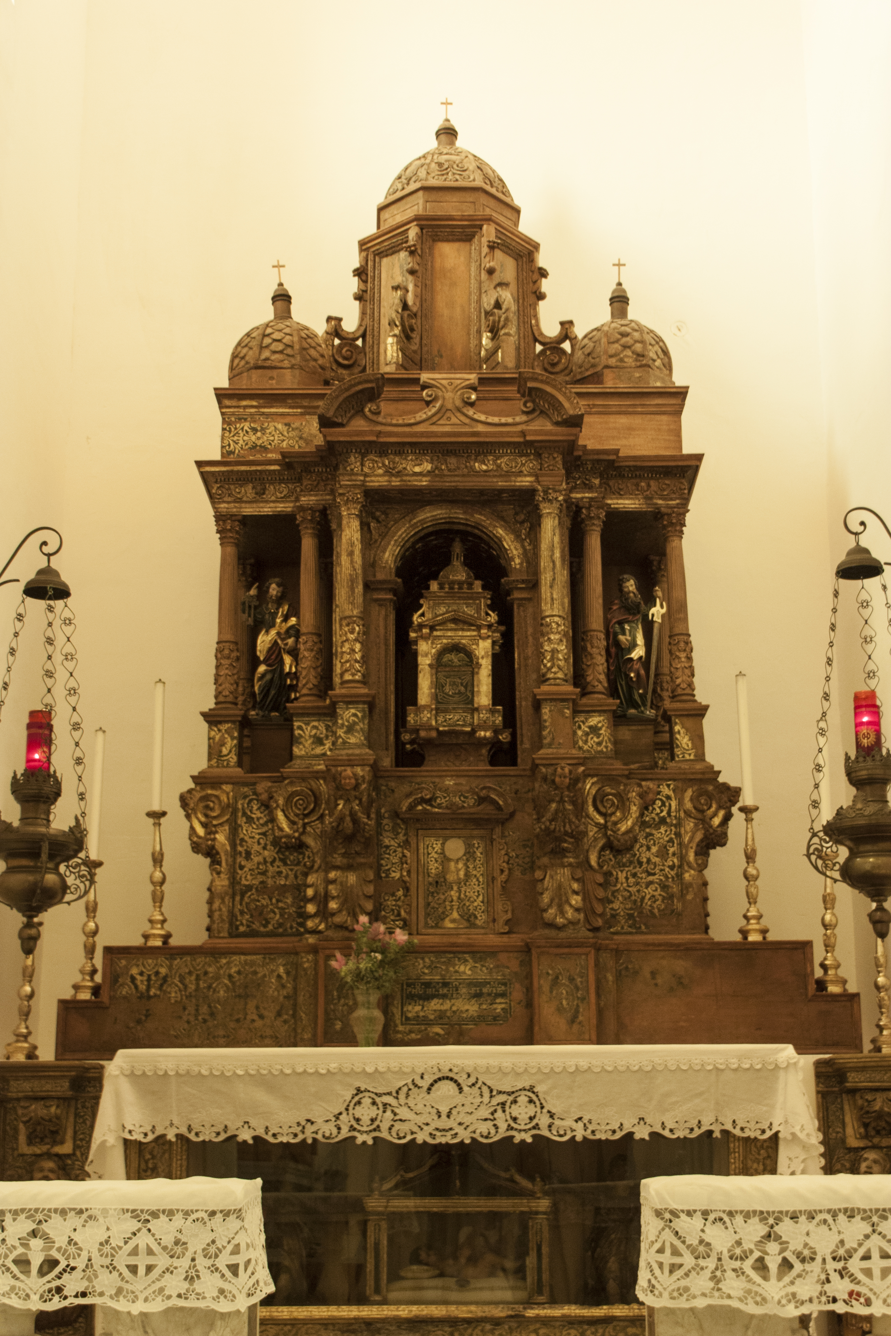 Altare duomo Castroreale